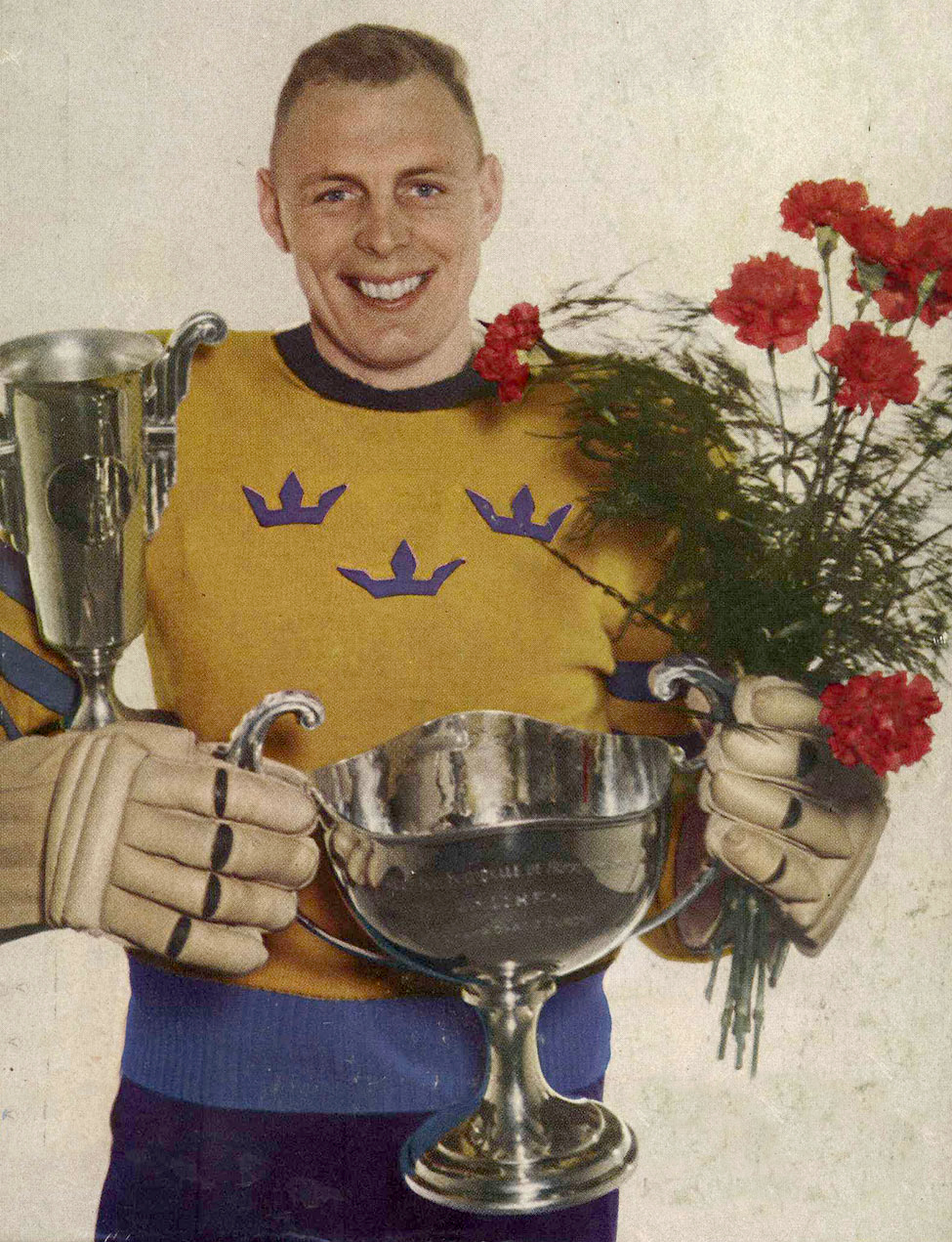 Lars "Lasse" Björn (1931- )